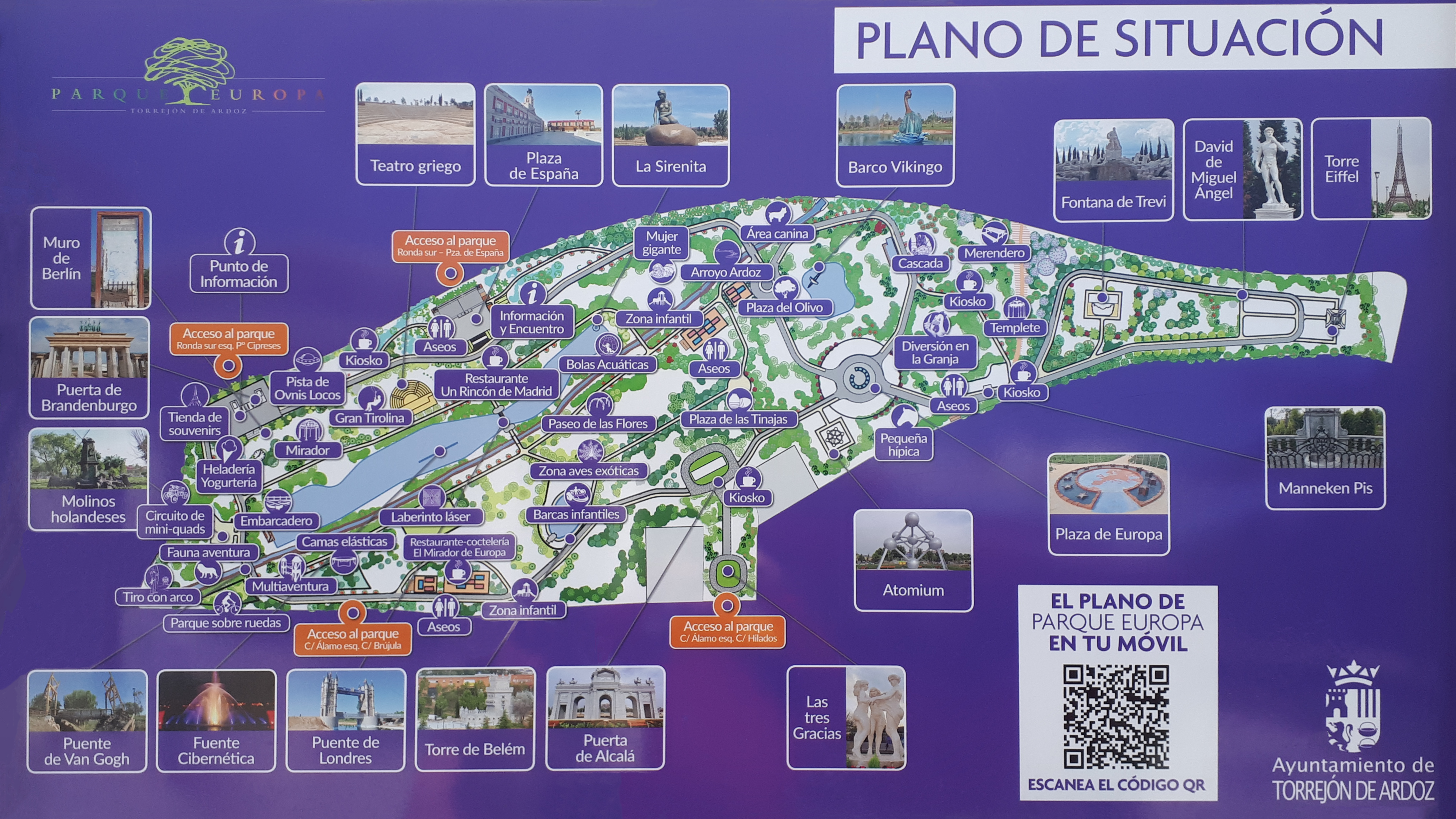 El Parque Europa es una instalación municipal recreativa de Torrejón de Ardoz (Comunidad de Madrid - España) inaugurado en el 3 de septiembre de 2010. Plano general de las instalaciones.